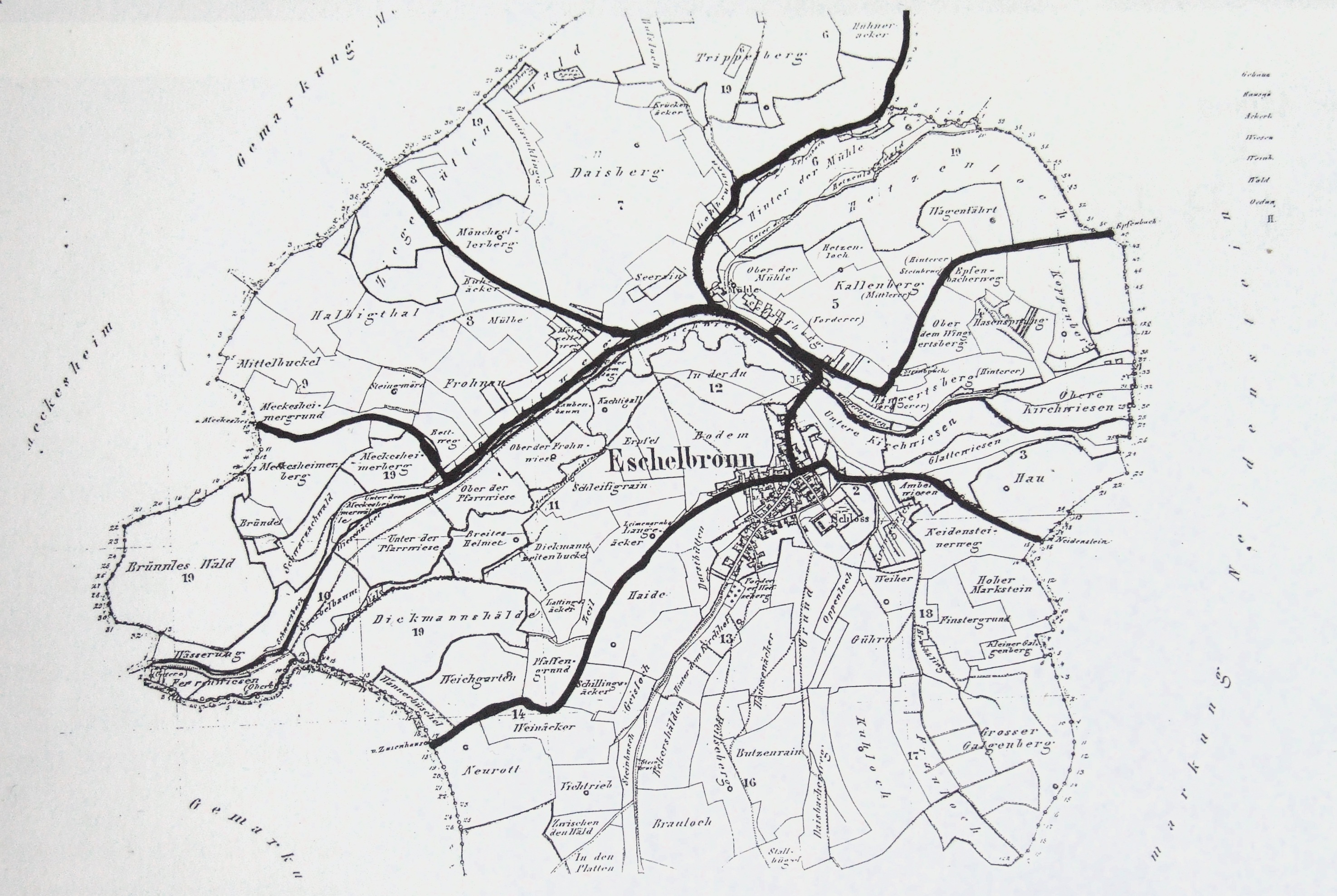 Alte Gemarkungs- und Wegekarte von Eschelbronn